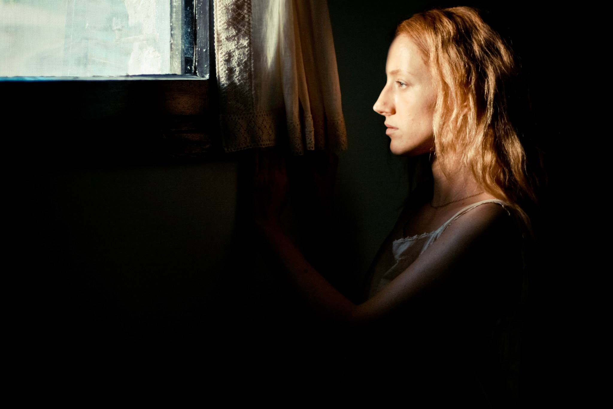 הילה וידור בסרטו של אדם סנדרסון לוויה בצהרים